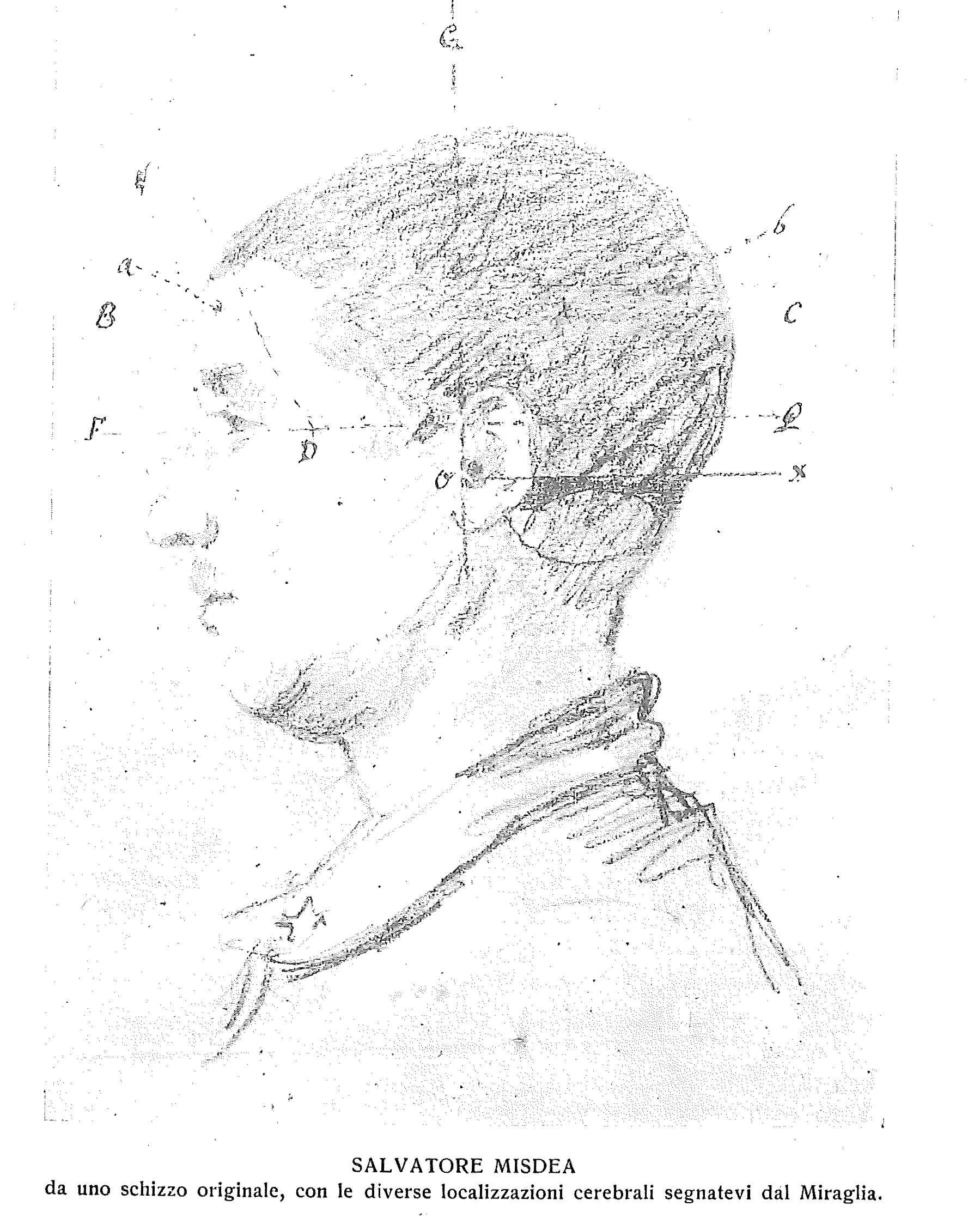 Schizzo originale del celebre frenologo italiano Biagio Gioacchino Miraglia relativo alle localizzazioni cerebrali